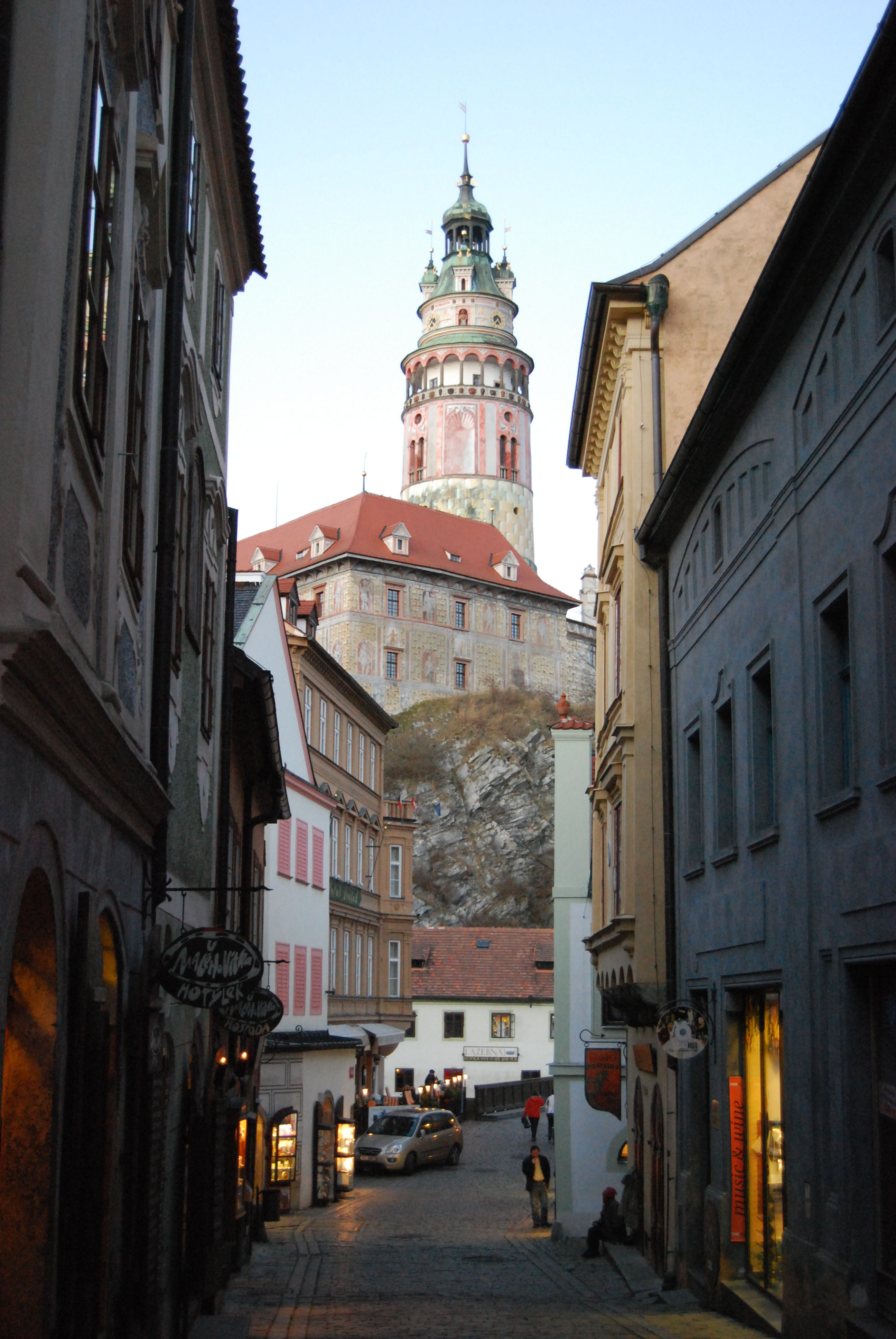 Český Krumlov. Okres Český Krumlov. Česko.